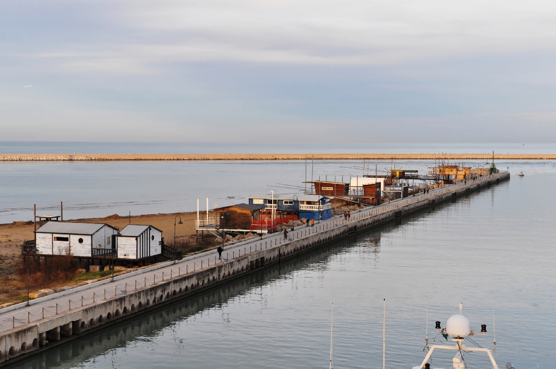 Ponte del mare Pescara Winter 2013